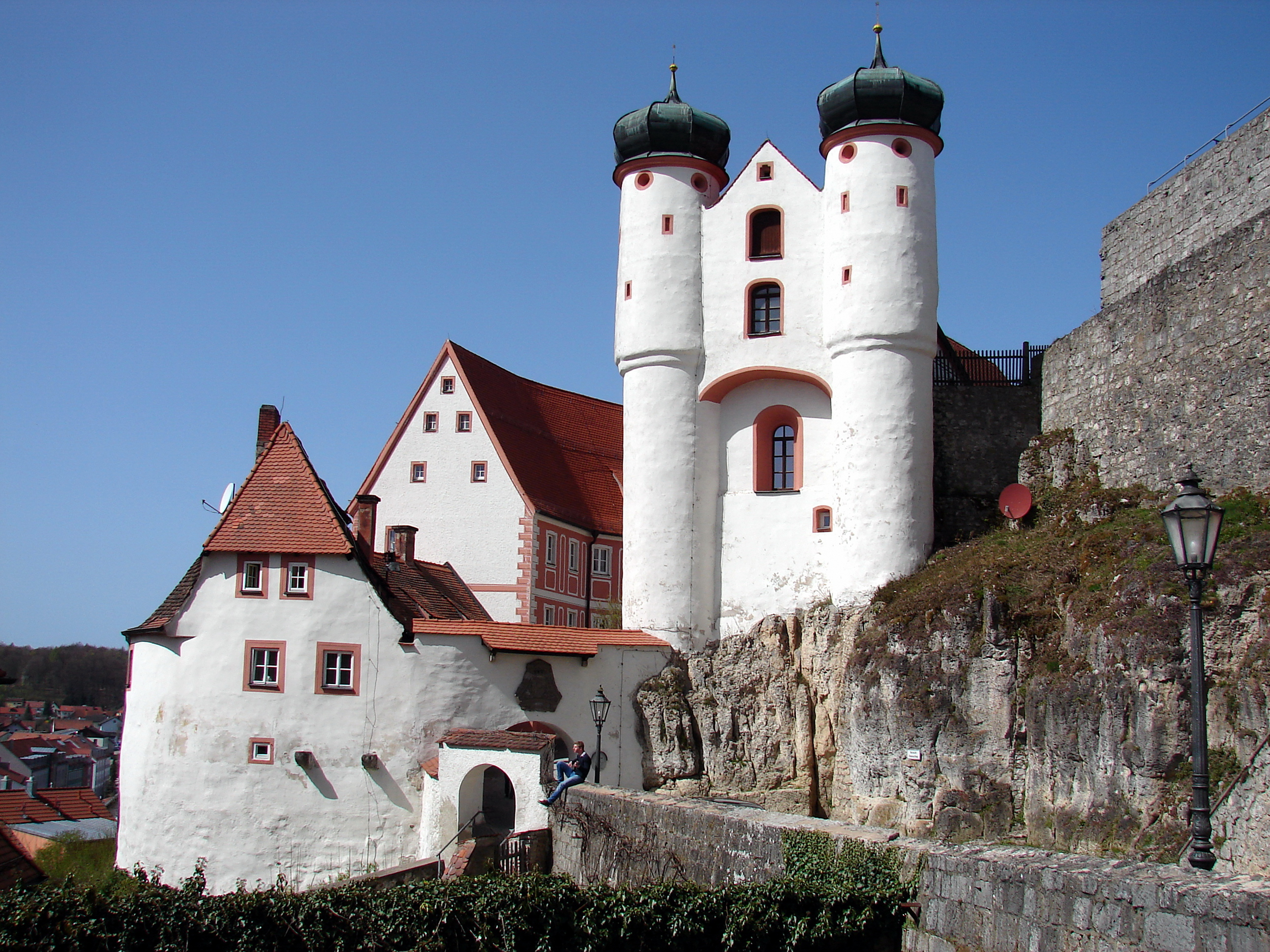 Die Burg Parsberg ist eine Höhenburg auf 550 m ü. NN in der Stadt Parsberg im Landkreis Neumarkt in der Oberpfalz in Bayern.